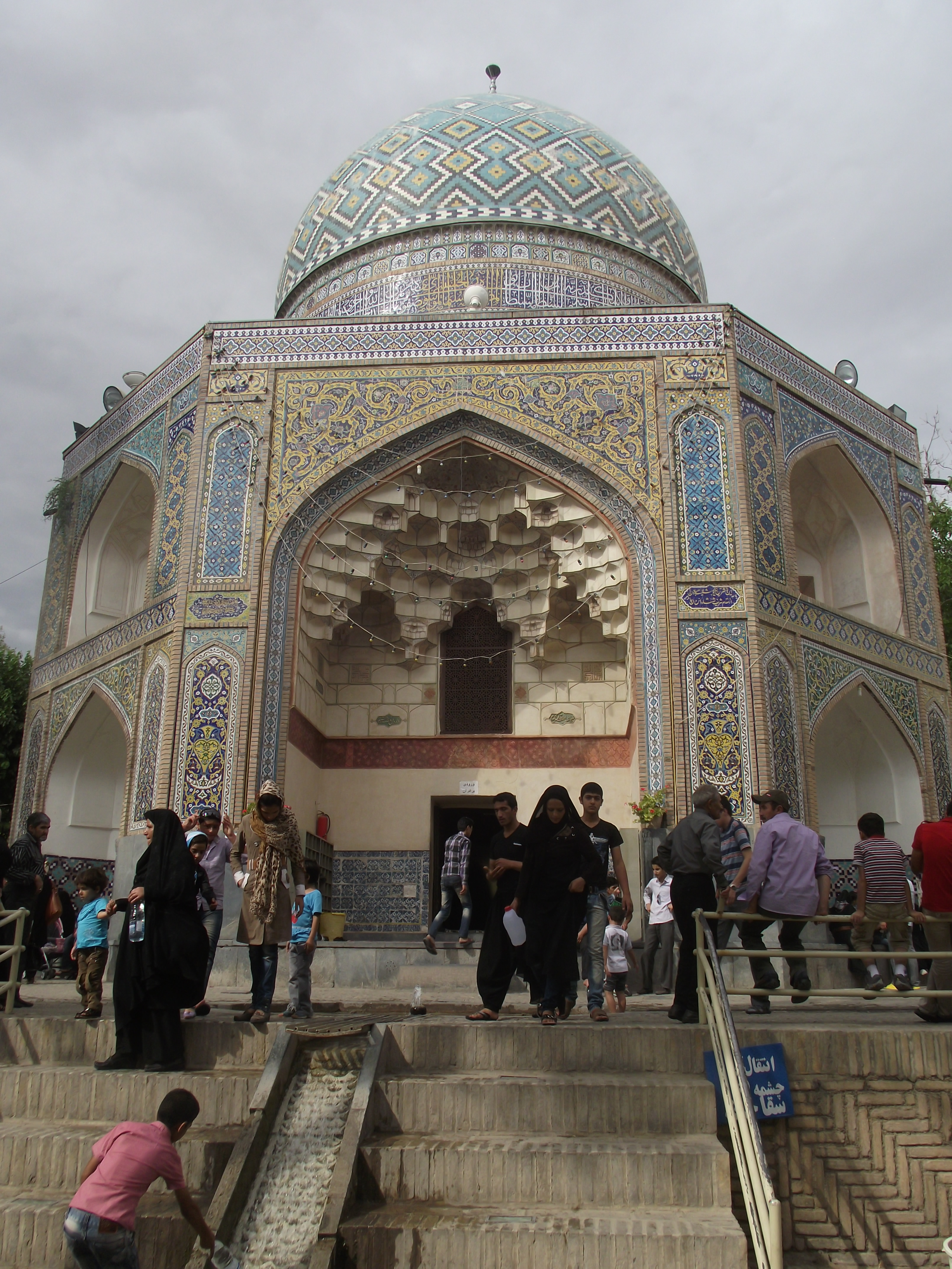 کاروان‌سرای قدمگاه